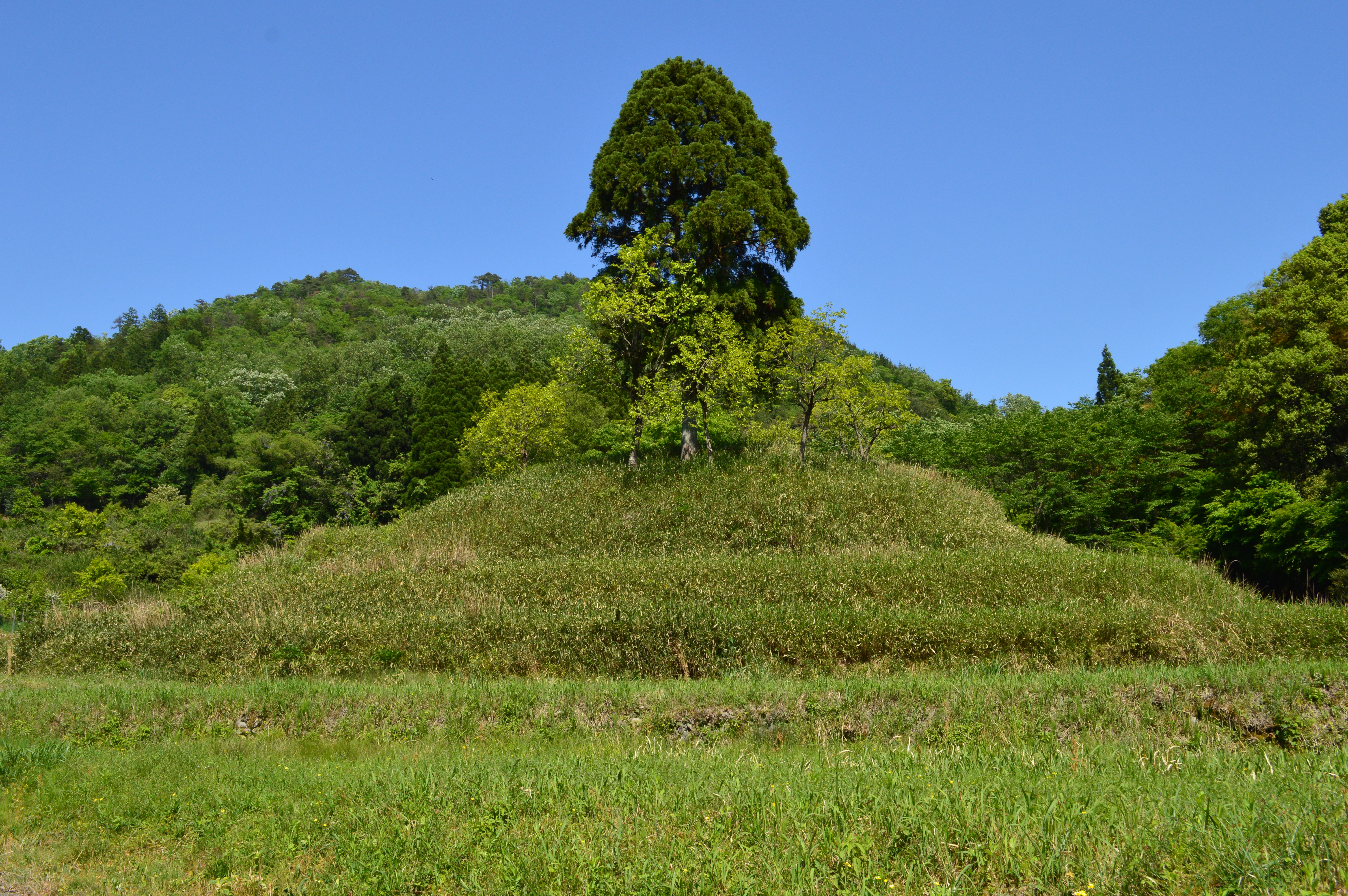 出石茶臼山古墳